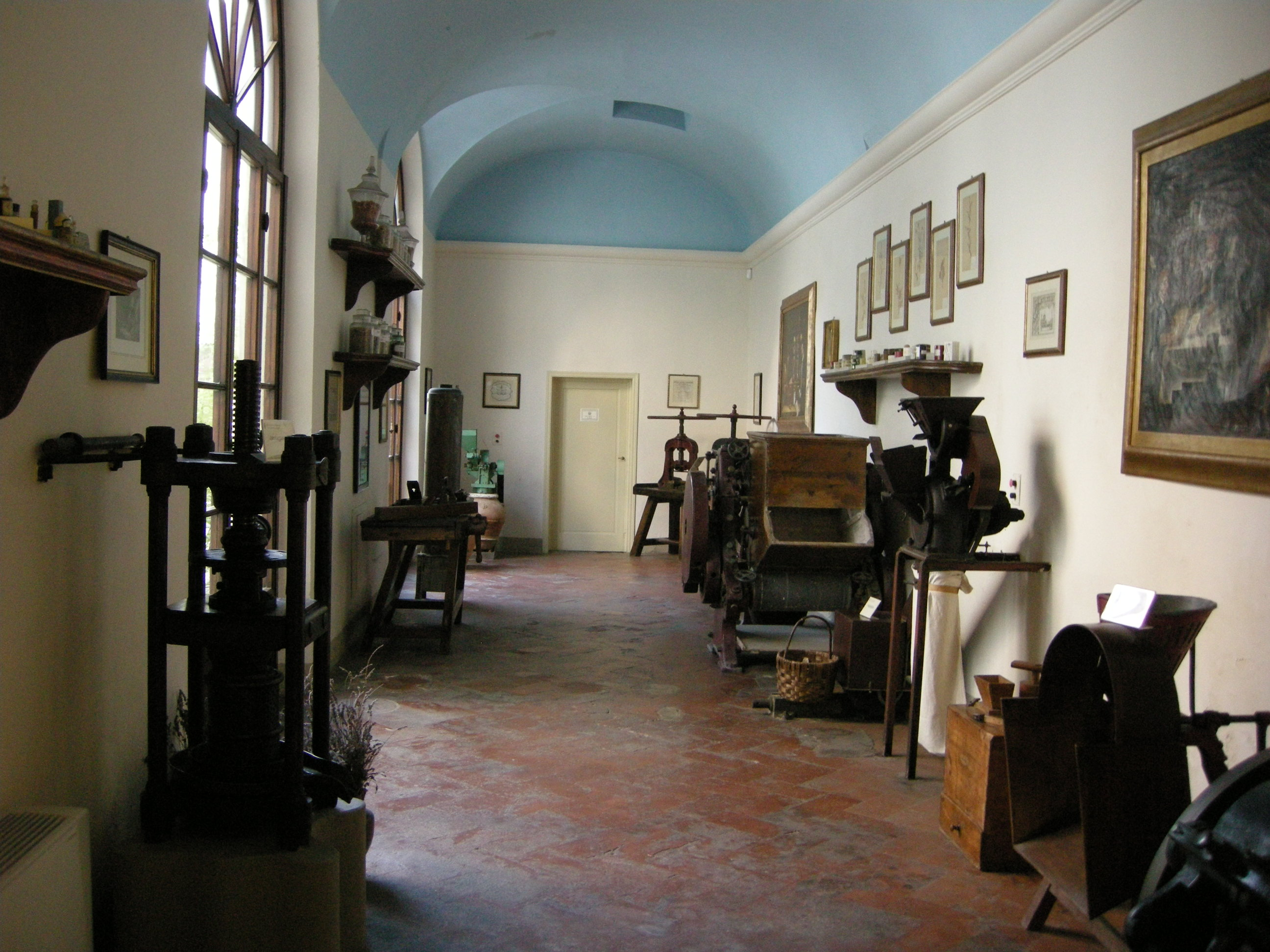 Farmacia di smn, museo